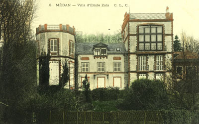 Carte Postale de Médan ca 1880